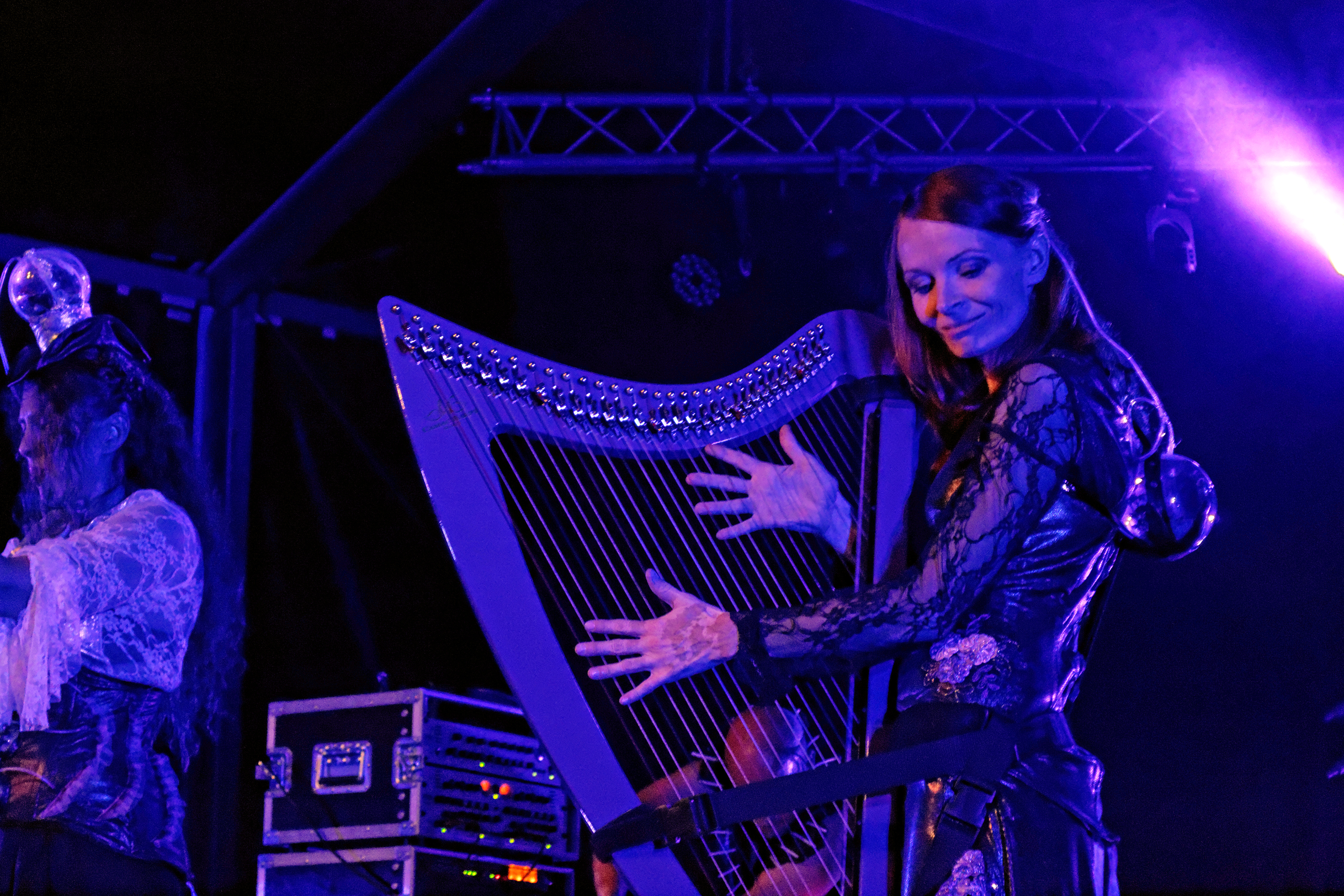 Arneo en concert à l'espace Pierre-Jakez Hélias lors du festival de Cornouaille 2014.